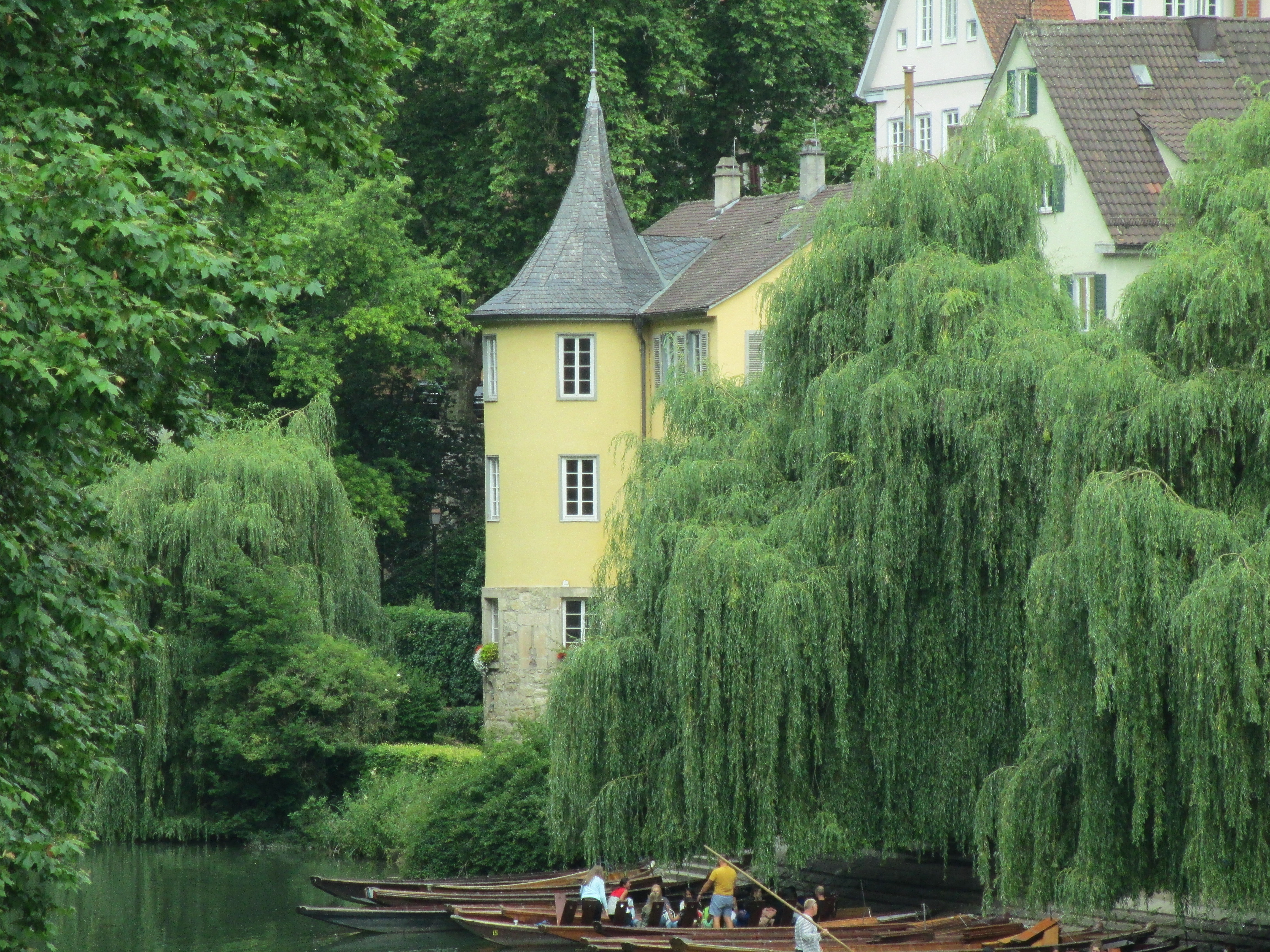 מגדל הלדרלין בטיבינגן